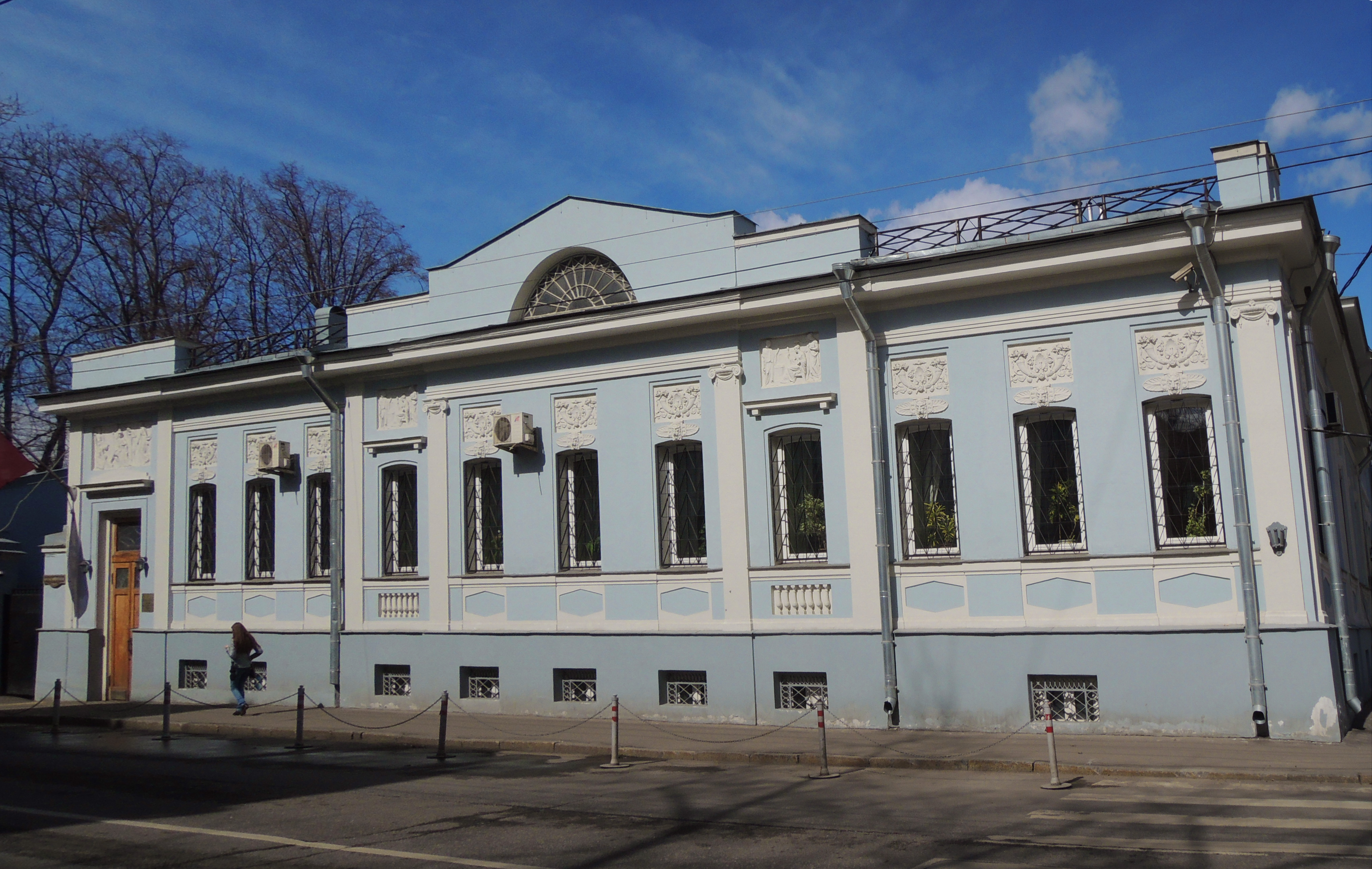 Малая Никитская. № 28/1 — Особняк С. А. Тарасова (1884, архитектор В. Н. Карнеев), ныне — посольство Туниса. После Тарасова затем принадлежал семье Бакакиных-Миндовских, в 1909—1913 годах по заказу А. И. Бакакина архитектором А. Э. Эрихсоном пристроен двухэтажный объем с квартирами для сдачи внаём. В особняке жил Л. П. Берия